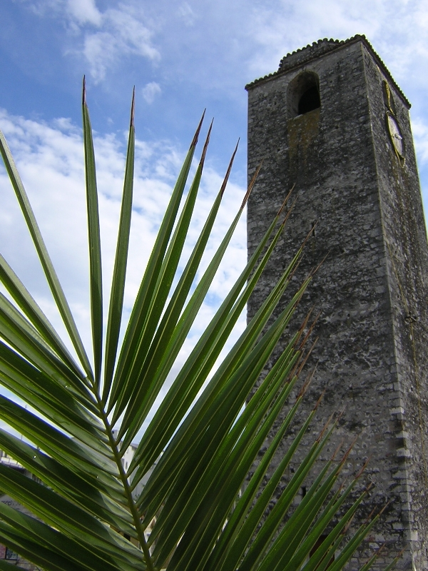 Podgorica